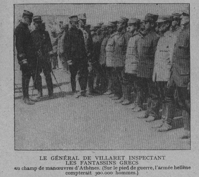 Le général de Villaret, organisateur de la 1e armée grecque en inspection.